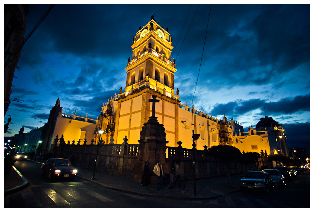 Catedral (plaza principal) This medium shows the protected monument with the number H/00-001 in Bolivia.